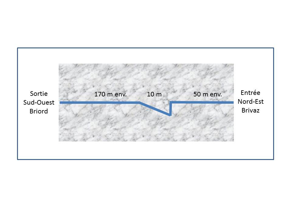 Briord. Aqueduc-tunnel. Schéma sommaire du tracé à travers la colline de la Briarette.